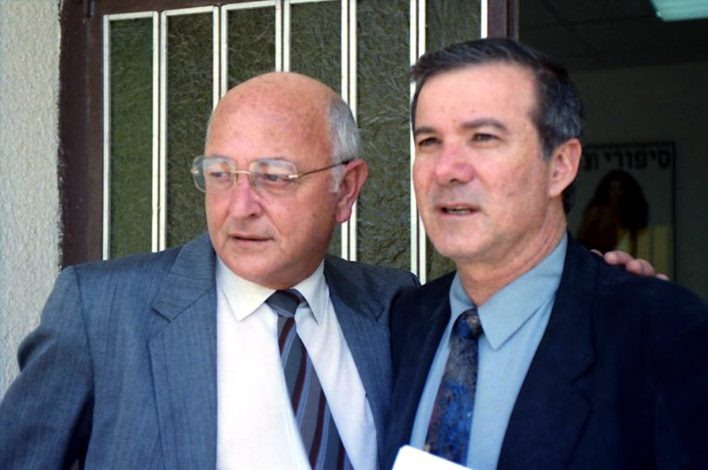 יורם גלובוס ונציגו בישראל אורי פורת שכיהן כיו"ר מועצת המנהלים של חברת "גלובוס גרופ"